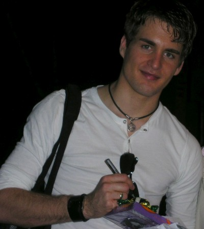 Sänger Alexander Klaws in Berlin